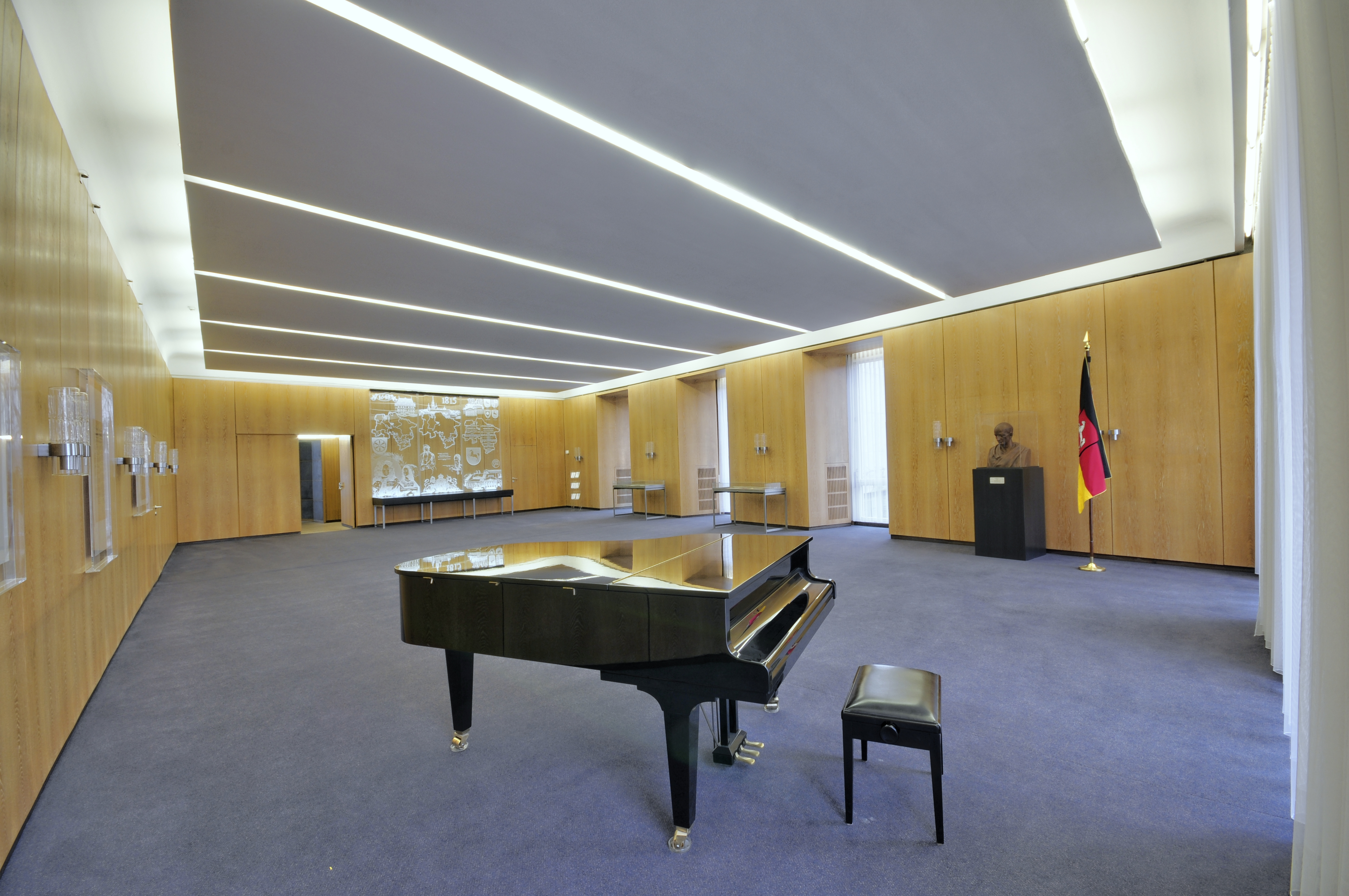 Landtag Niedersachsen, Hannover Wikipedia im Landtag – Niedersachsen 19. März 2013 in HannoverDieses Bild entstand während eines Fototermins im Niedersächsischen Landtagsgebäude in Hannover vor dem geplanten Abriß und Neubau bis 2017. Die Landtagsverwaltung hat uns gestattet, alle Räume zu dokumentieren.